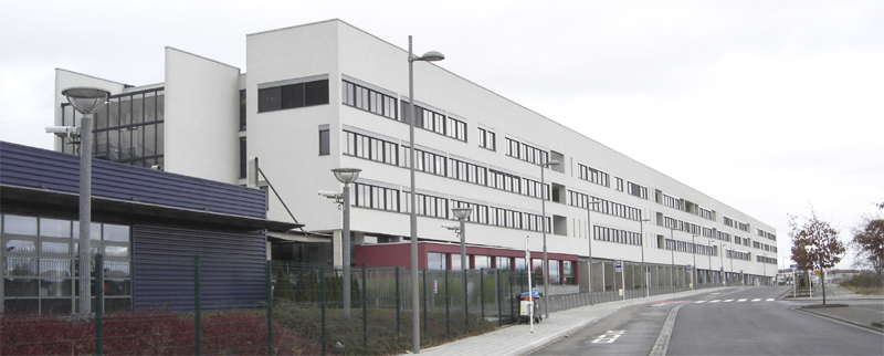 LTE Haaptgebai Op Sommet zu Raemmerech